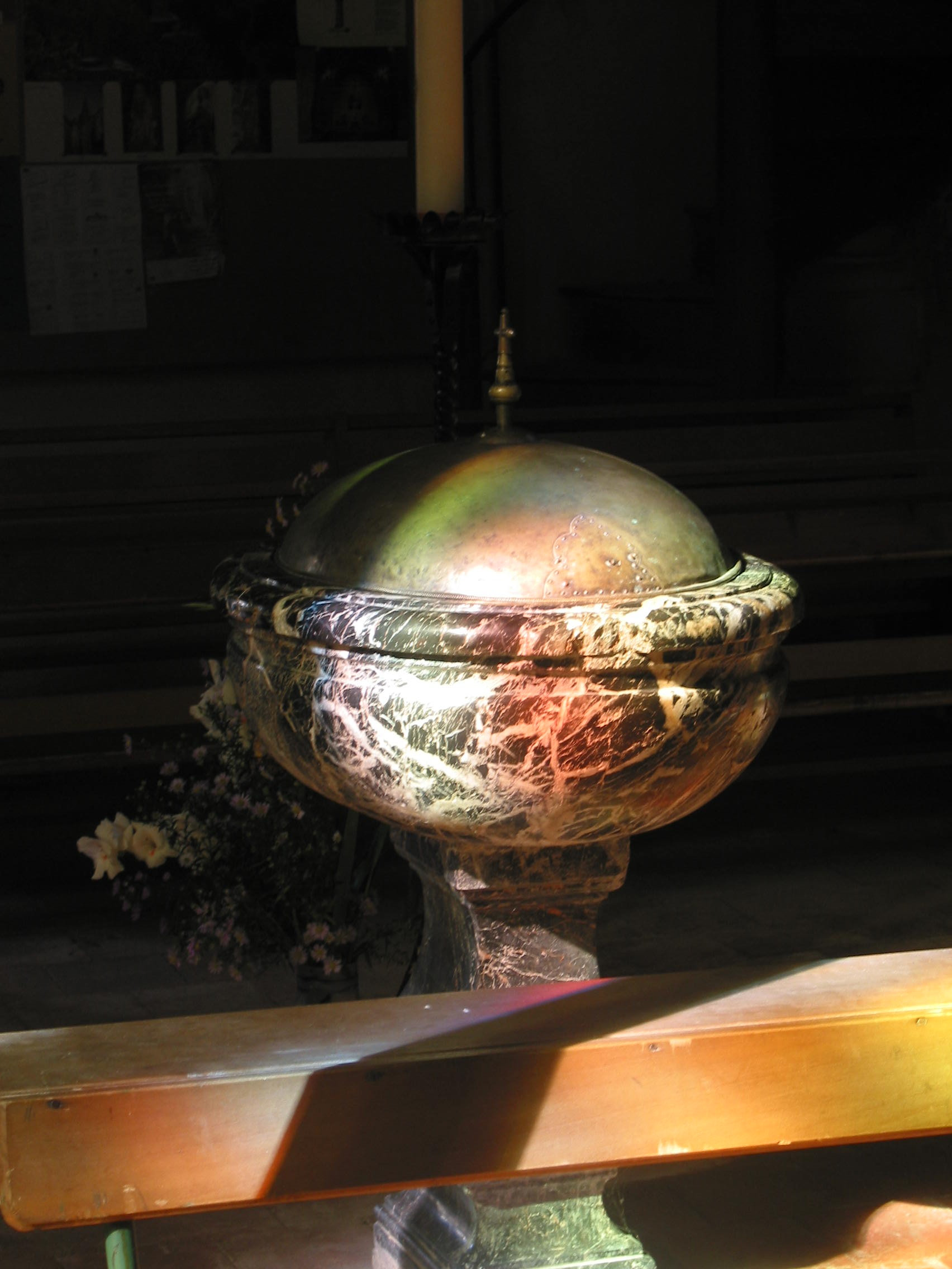 Fonds baptismaux Sainte-Suzanne